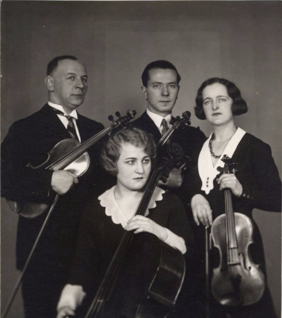 Polish quartet. L-R: Mieczysław Fliederbaum, Mieczysław Szaleski, Irena Dubiska, Zofia Adamska